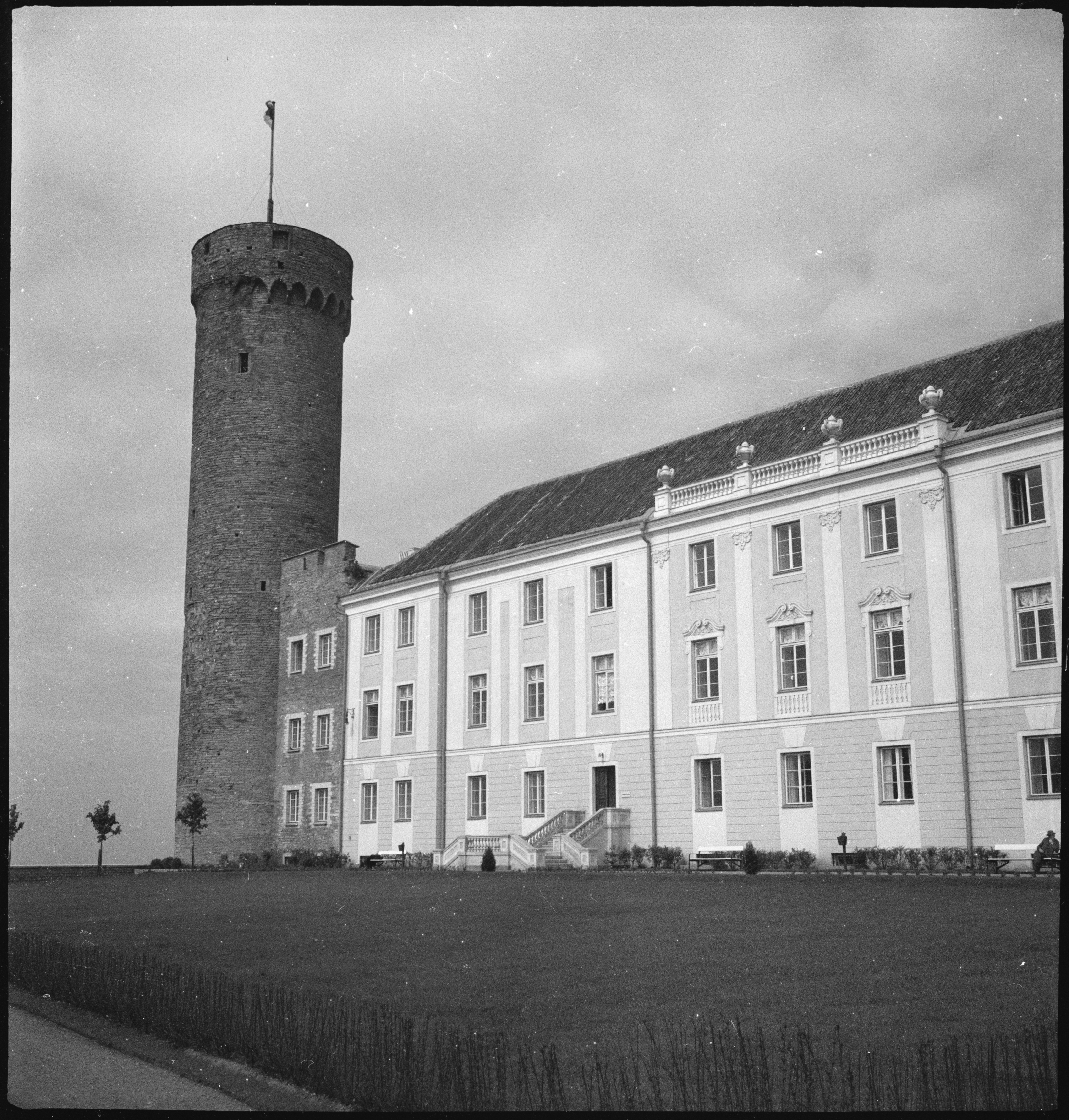 Estland, Tallinn (Reval): Gebäude; Gebäude mit rundem Turm